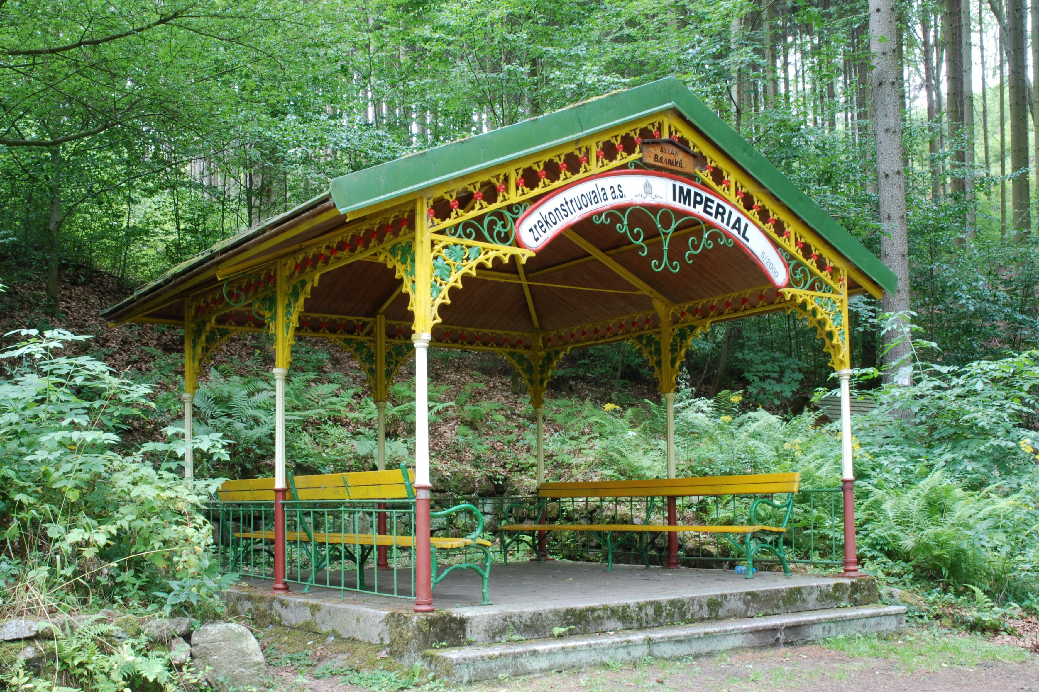 Altán Básníků v karlovarských lázeňských lesích při Beethovenově cestě